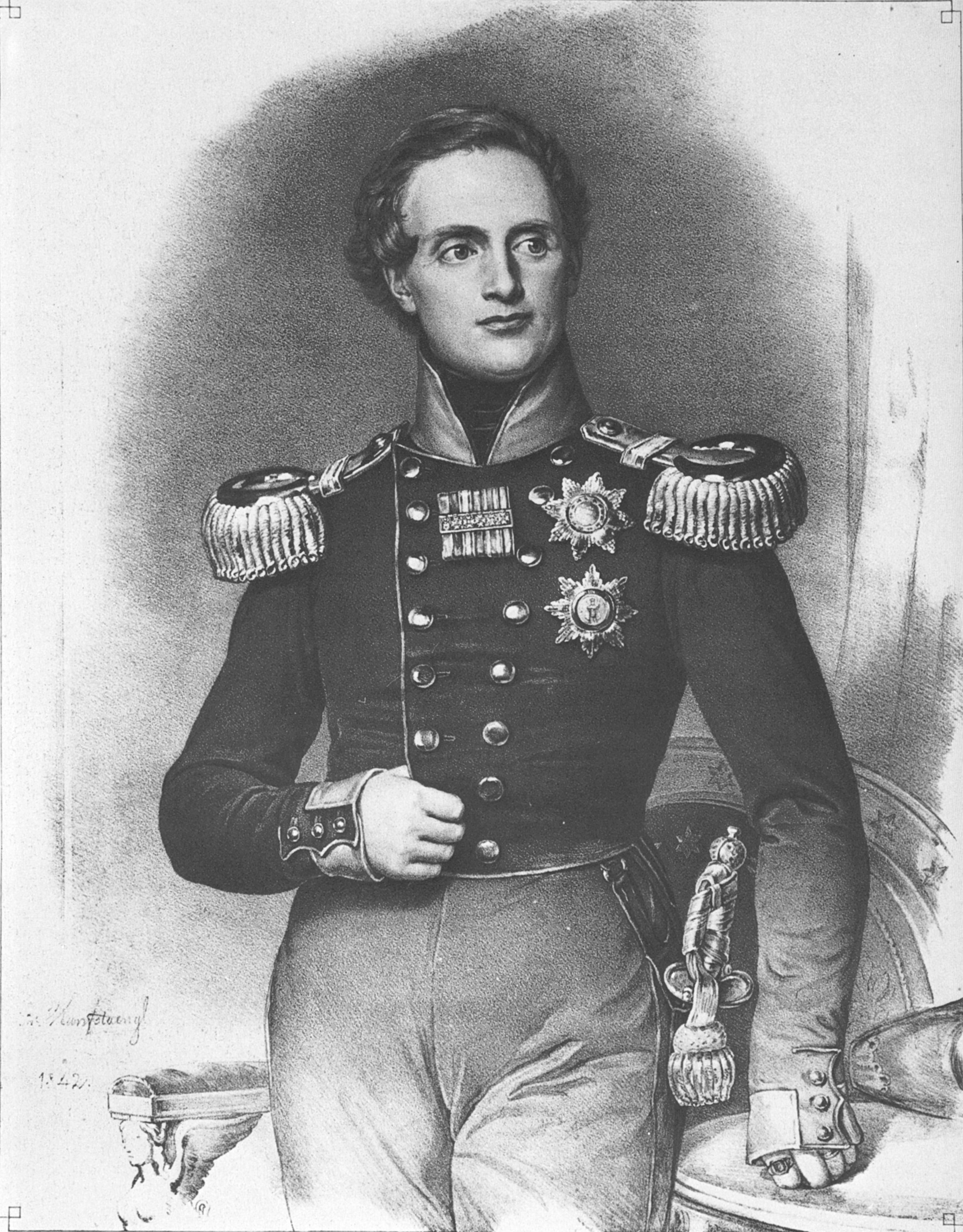 Friedrich August, König von Sachsen (1797-1854), Lithography